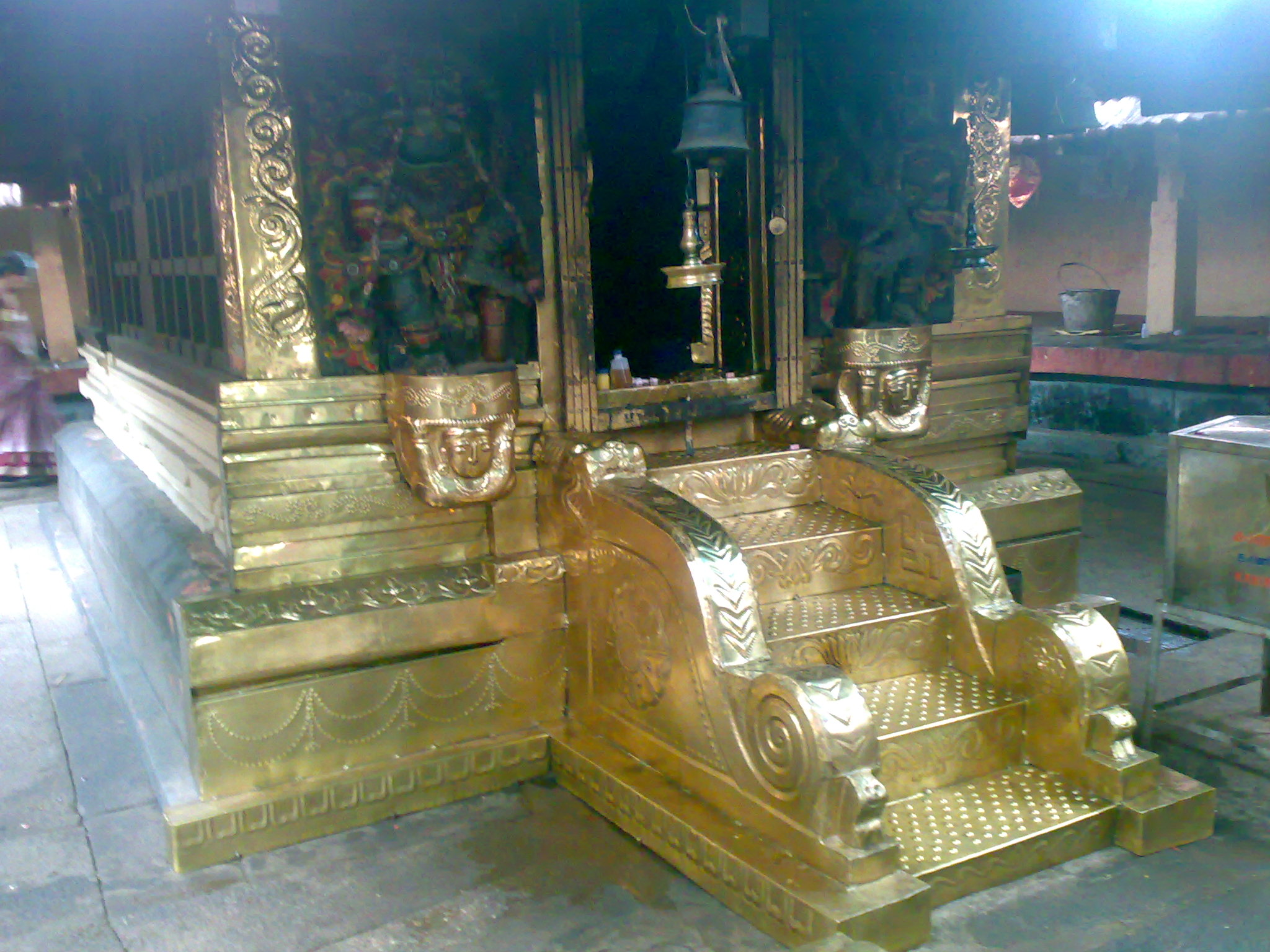 വാഴപ്പള്ളിക്ഷേത്രത്തിലെ മഹാഗണപതി ശ്രീകോവില്‍